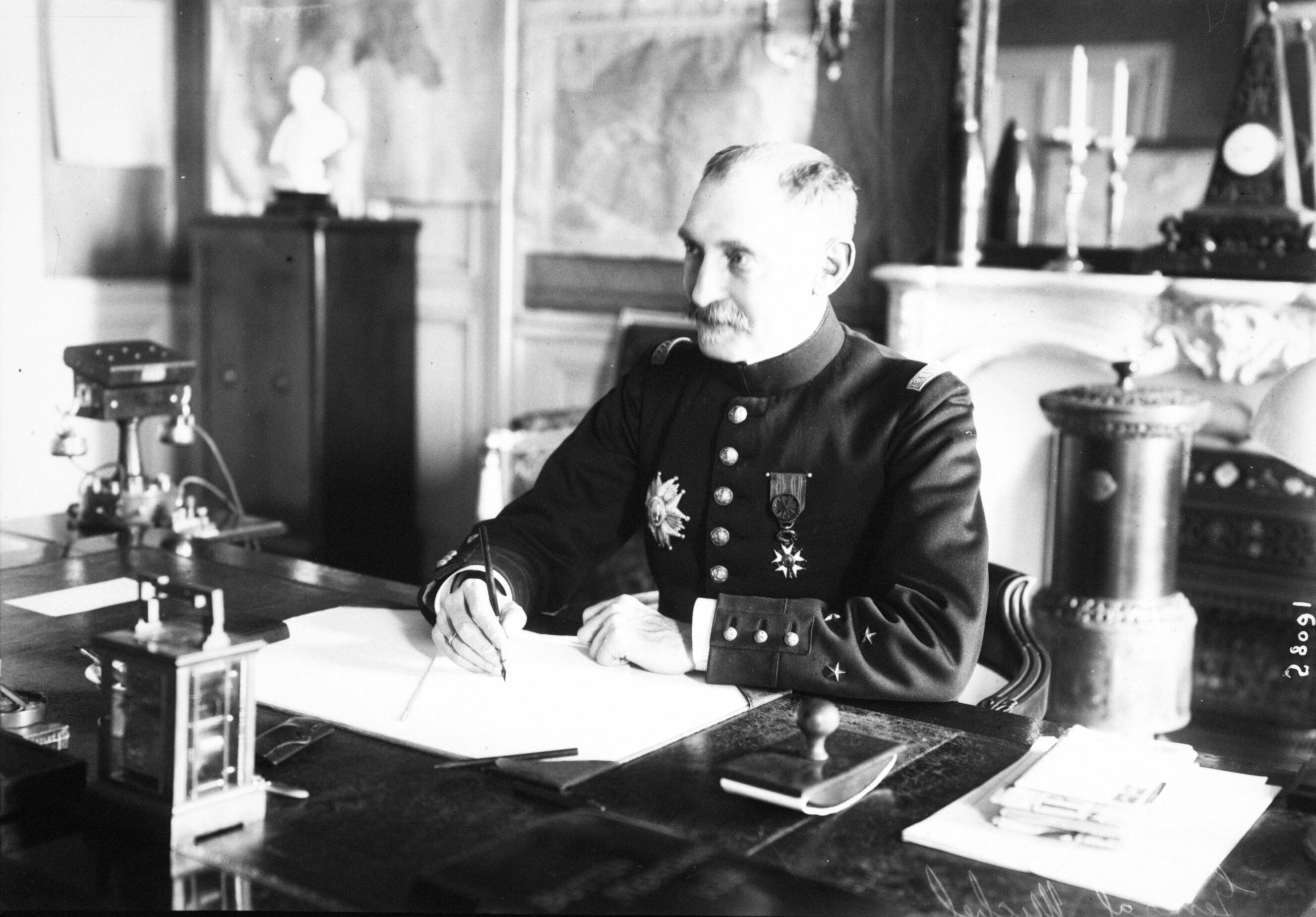 Portrait du général Victor-Constant Michel à son bureau.